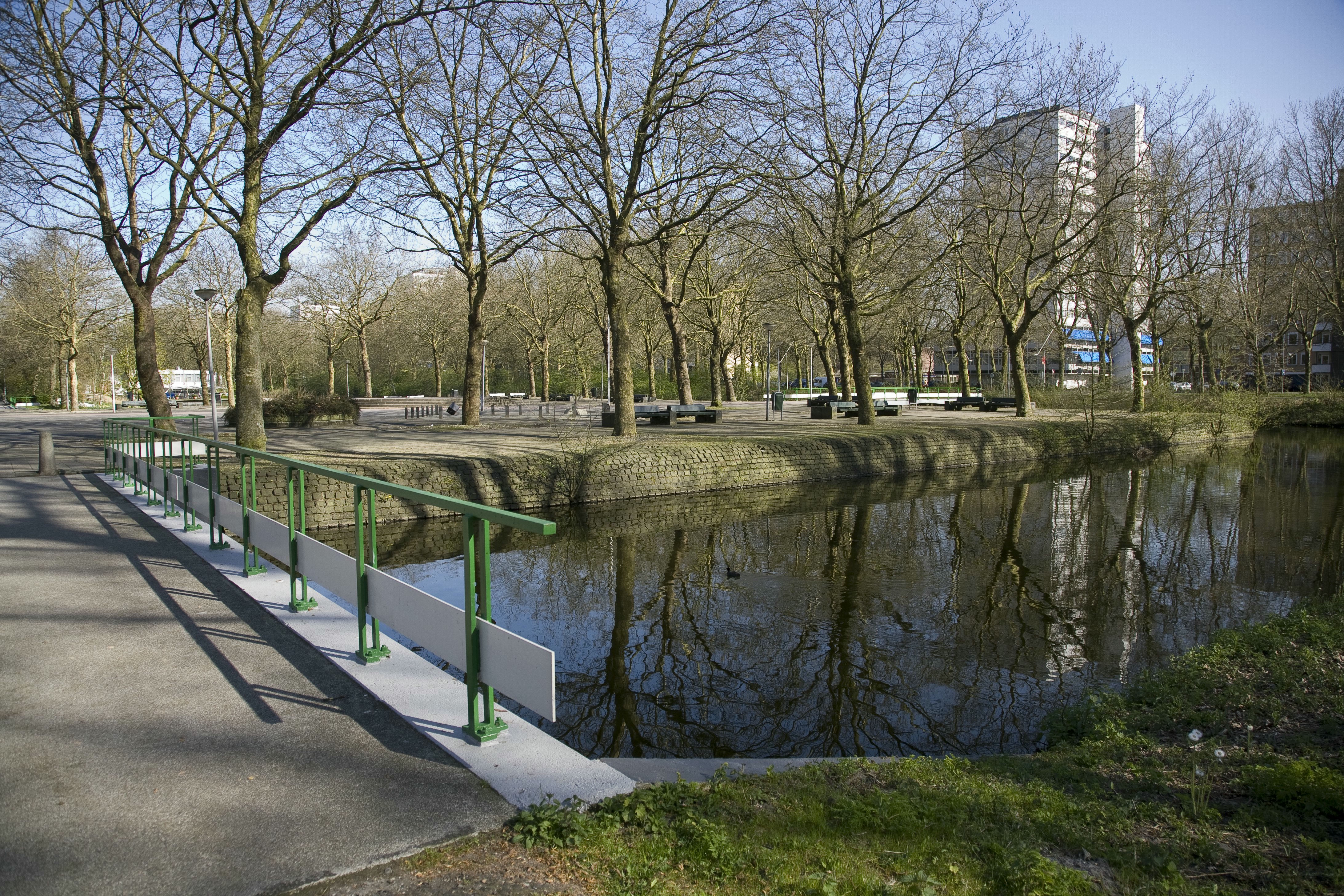 Gijsbrecht van Aemstelpark: Overzicht park, met voetgangersbrug over water